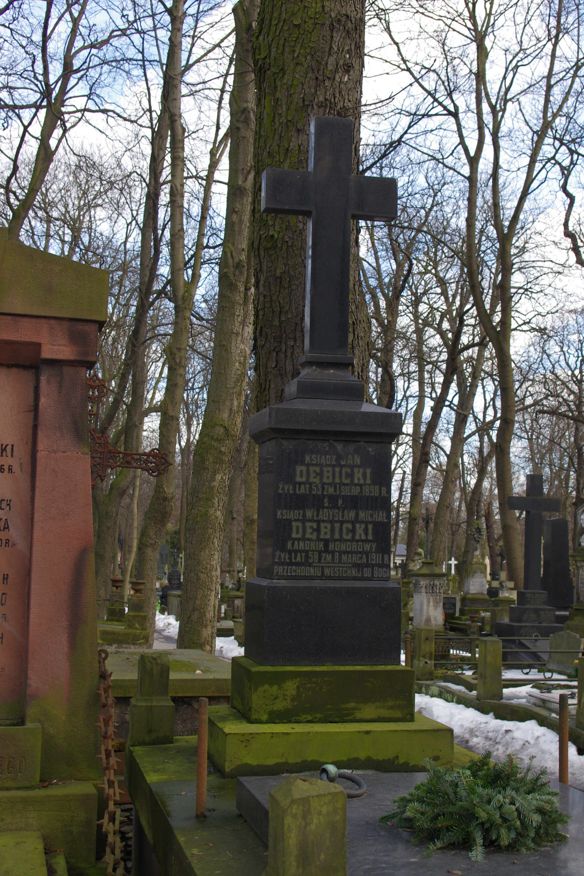 Grób ks. Jana Dębickiego (1845-1898) i ks. kanonika Władysława Michała Dębickiego (1853-1911) - filozofa i teologa na Cmentarzu Powązkowskim w Warszawie